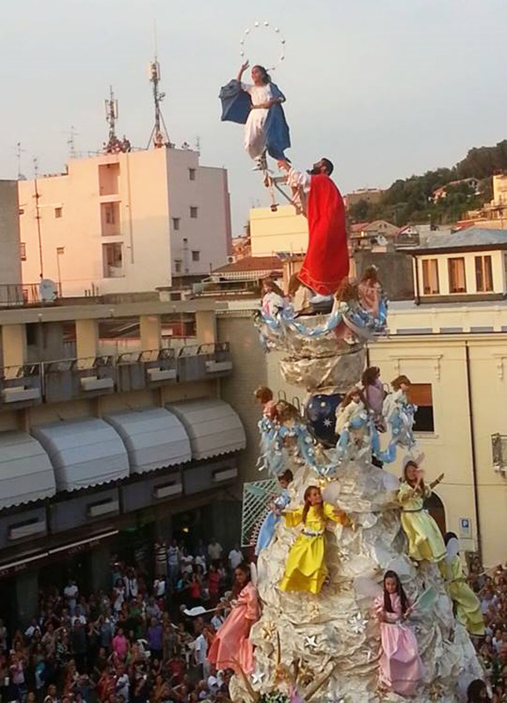 Nella foto la parte alta del carro votivo della Varia di Palmi 2013